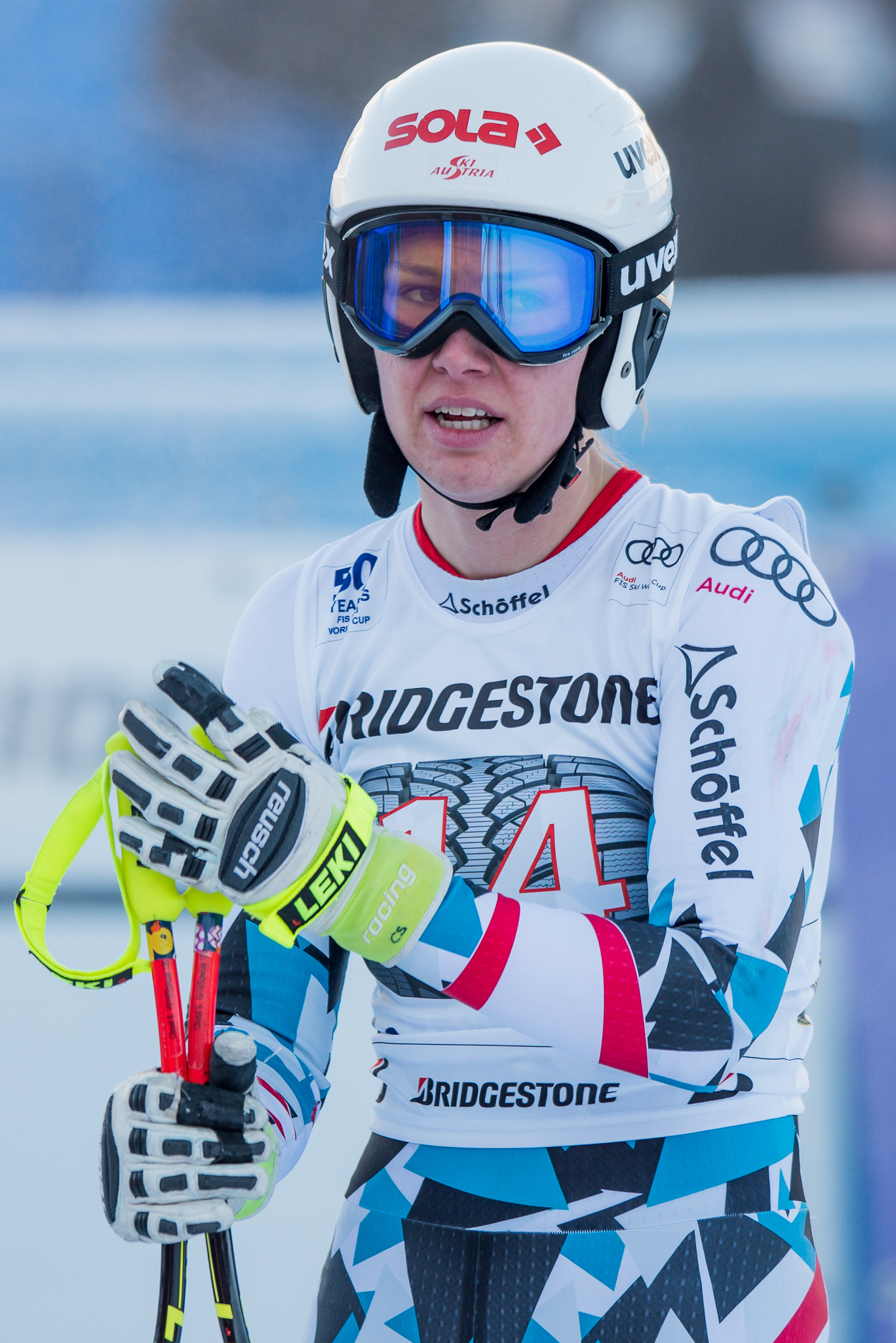 64. Kandahar Rennen,Audi FIS Ski Weltcup Garmisch-Partenkirchen,Christine Scheyer,Damen Abfahrt,Kandahar,Ladies Downhill